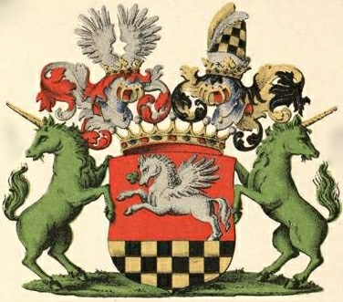 Bruiningki suguvõsa vabahärravapp